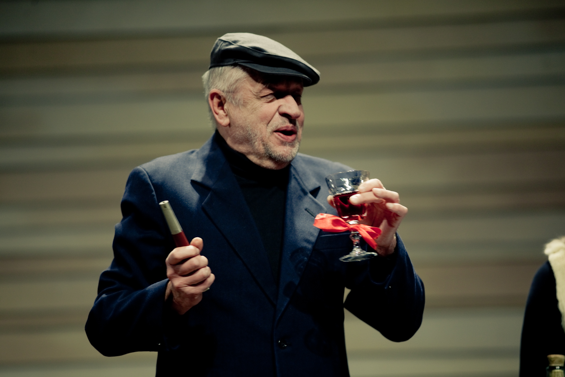 Raivo Adlas lavastuses 'Kalendritüdrukud'. Fotograaf Gabriela Liivamägi.